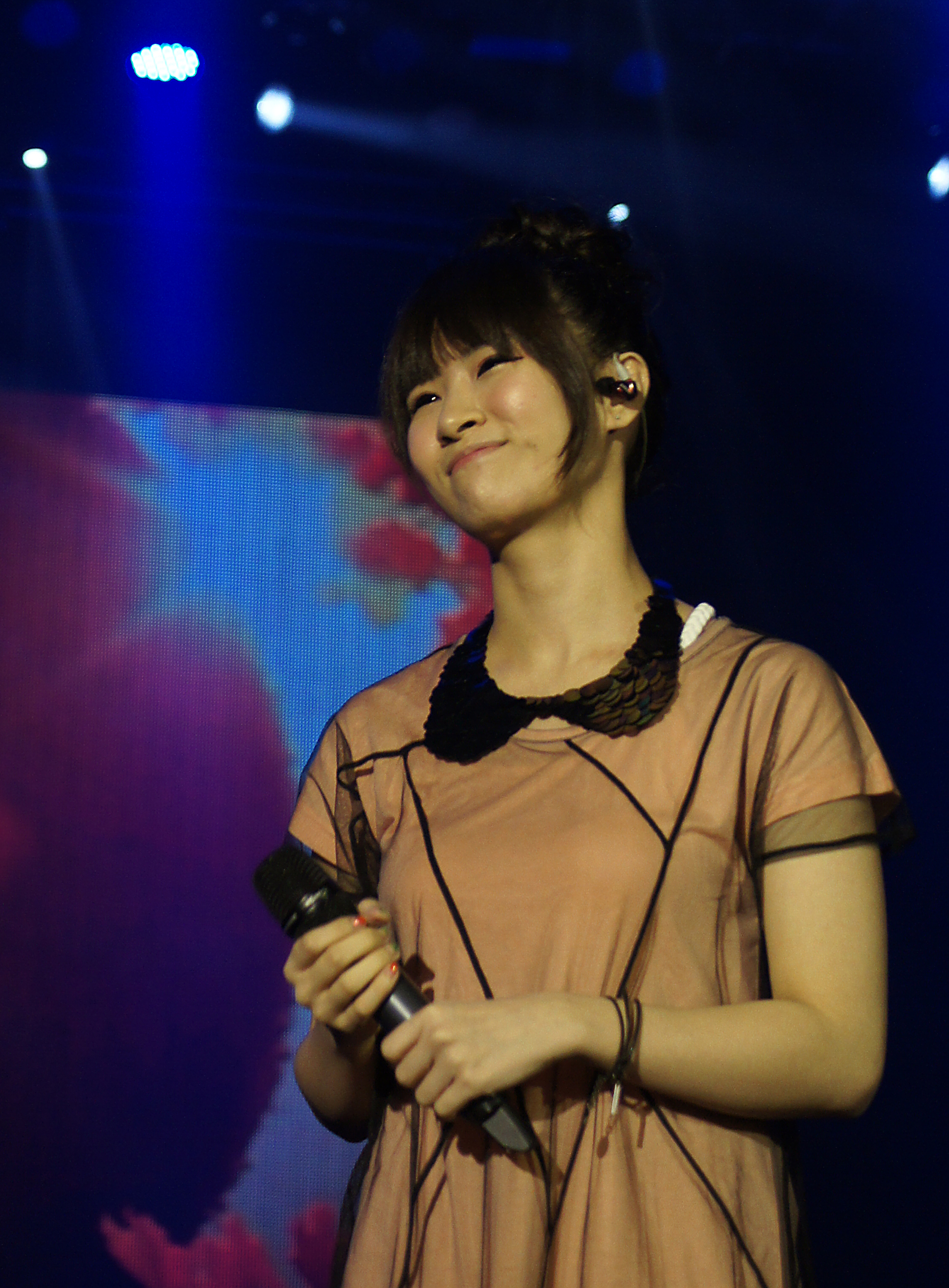 鄧福如出席2013年8月31日SHOW BOX @ ATT 4 FUN 的 HITFM 這夏樂翻了 Summer Party 音樂會